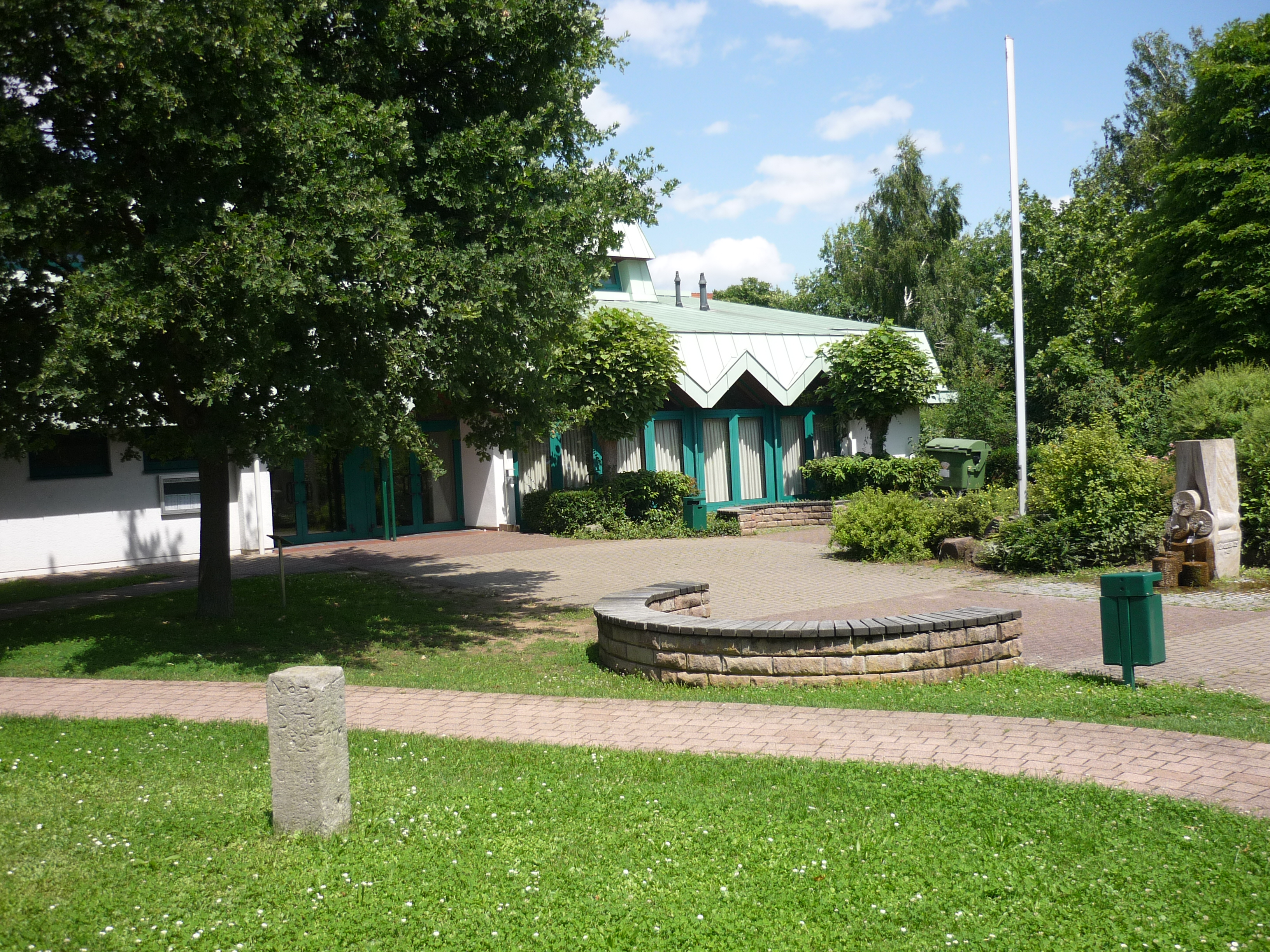 Westheimer Bürgerhaus